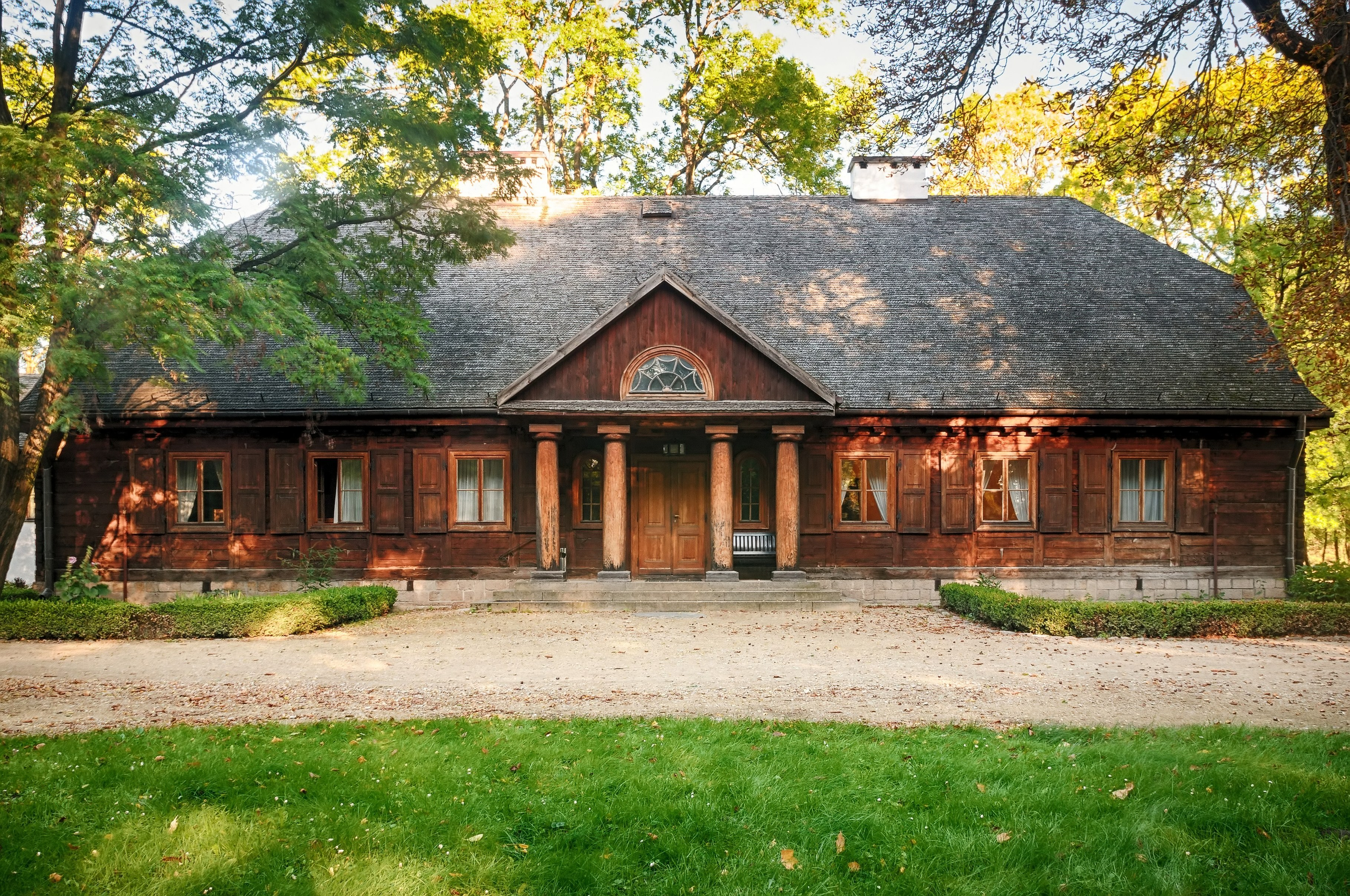 Radziejowice - drewniany dwór w zespole pałacowym (zabytek nr 756 z 22.03.1966)